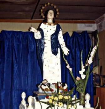 Foto di Santa Maria Assunta, Nizza.